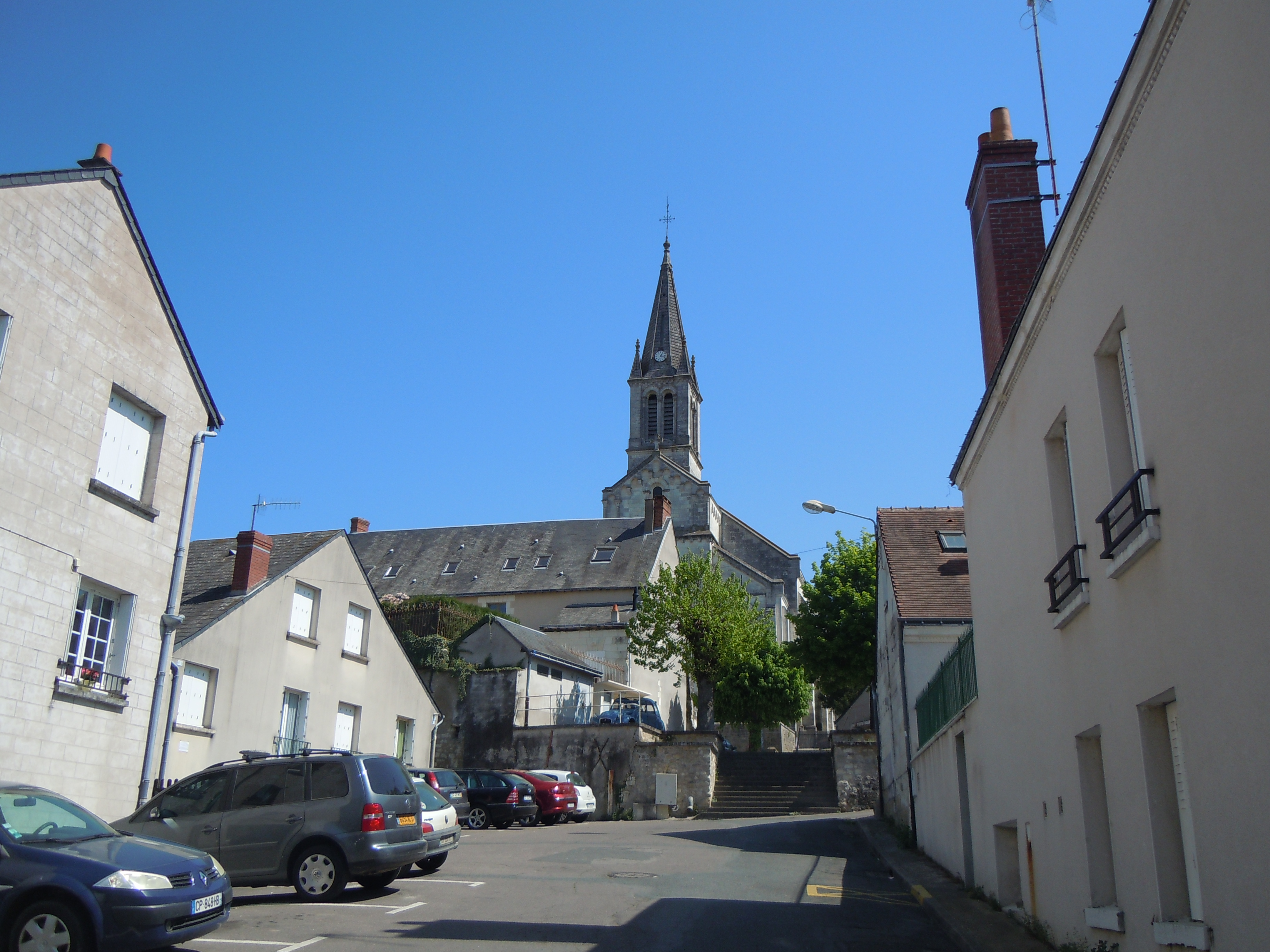 Rue de l'Église - Sainte-Maure-de-Touraine avec vue sur l'église Saint-Blaise